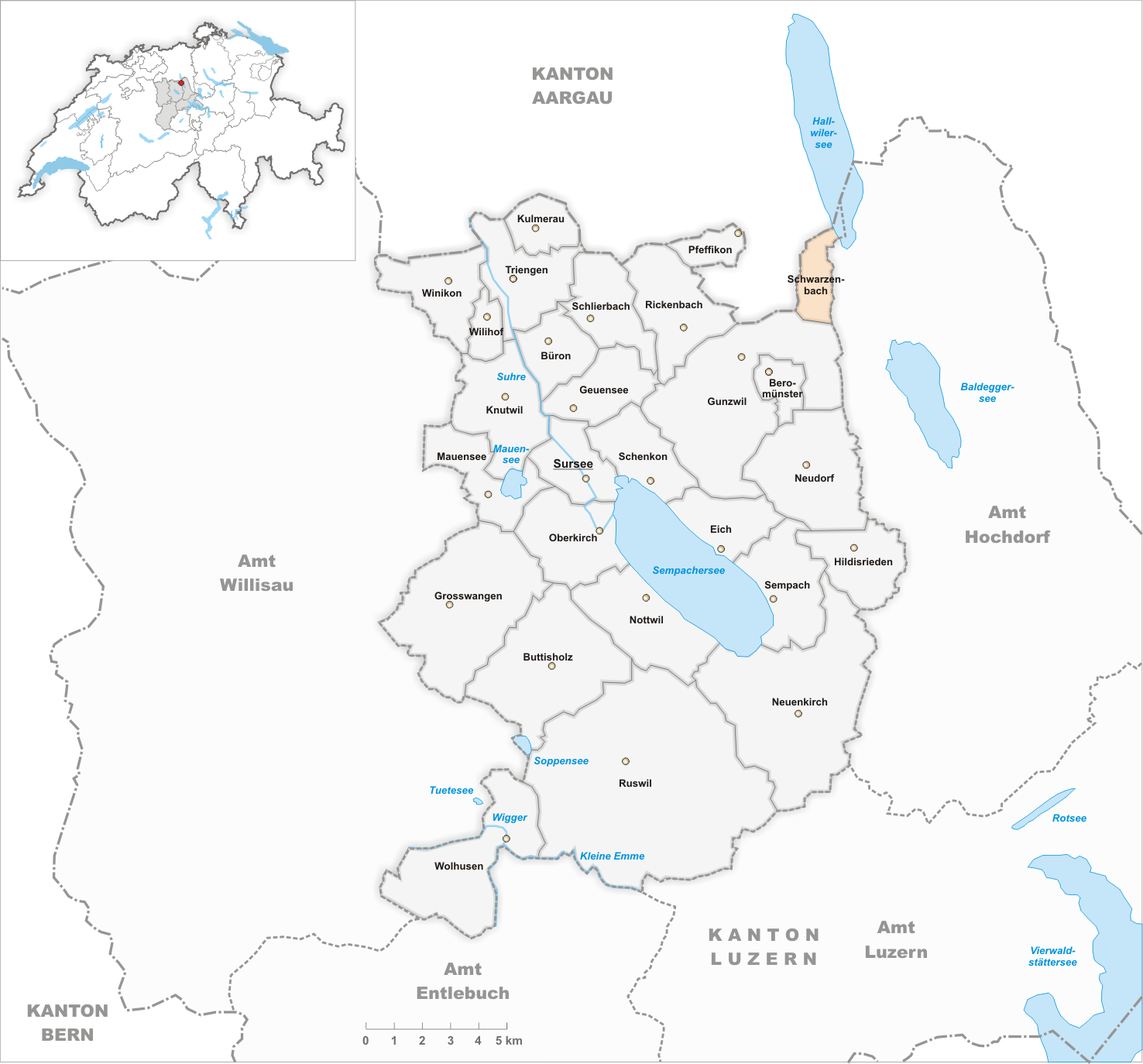 Municipality Schwarzenbach Artist: Tschubby